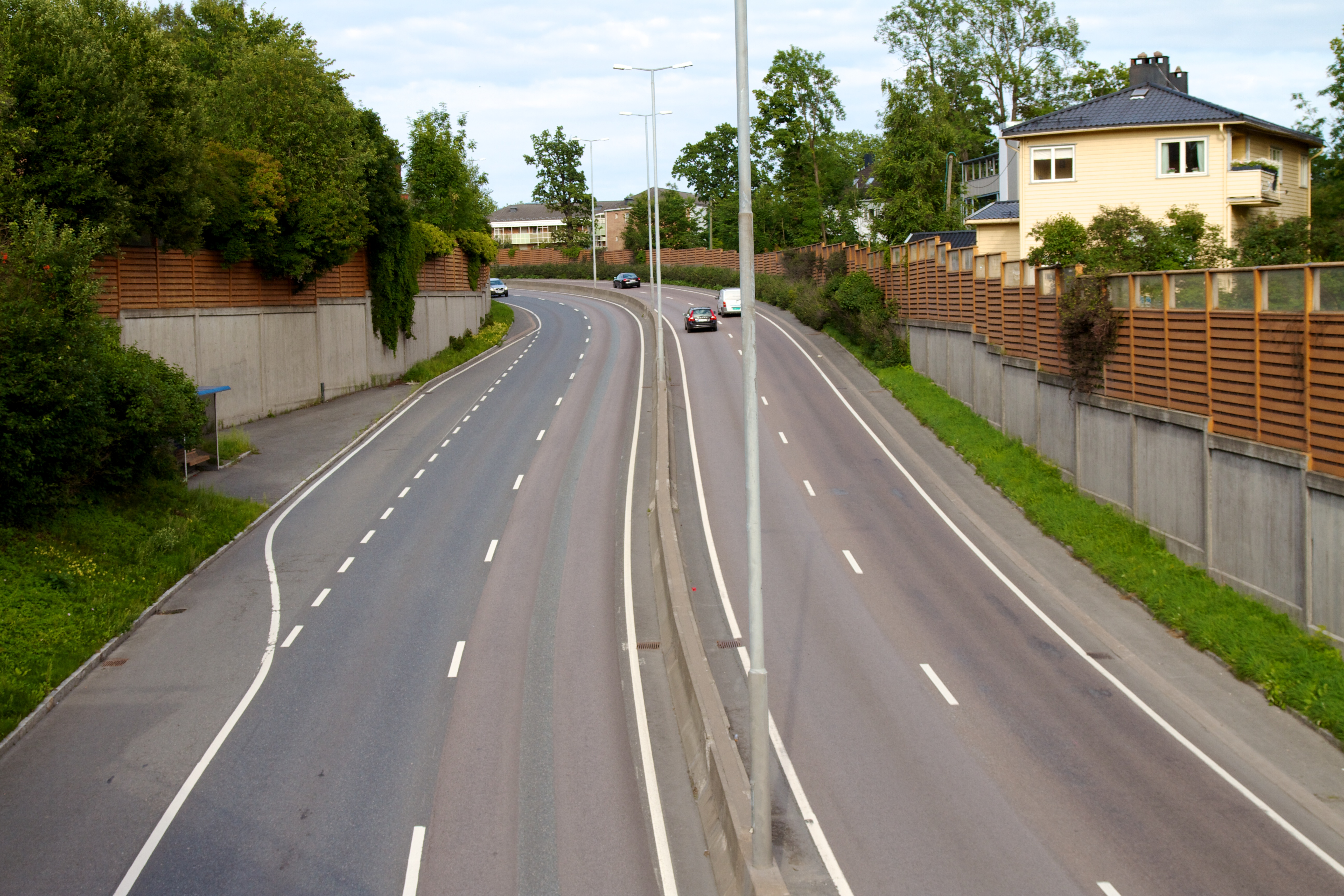 Ring 3 i Oslo, sett fra Holmenveien.